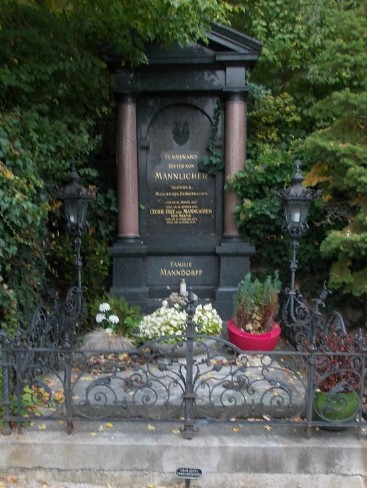 Andy Manndorff-Friedhof Hinterbrühl